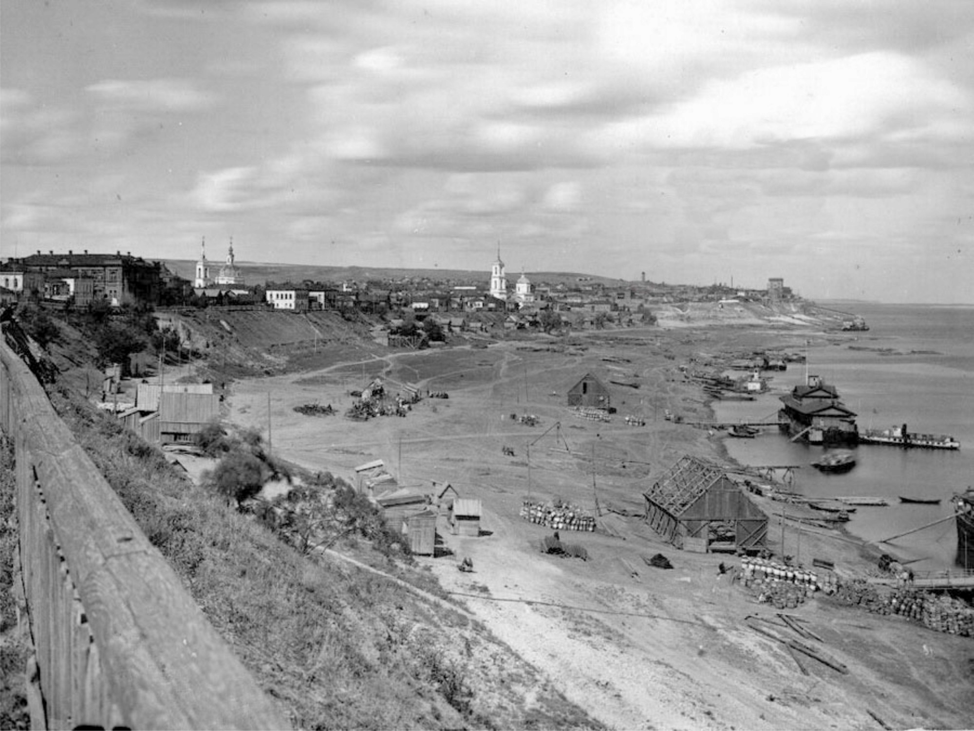 Набережная Волги в г. Камышине в начале XX века